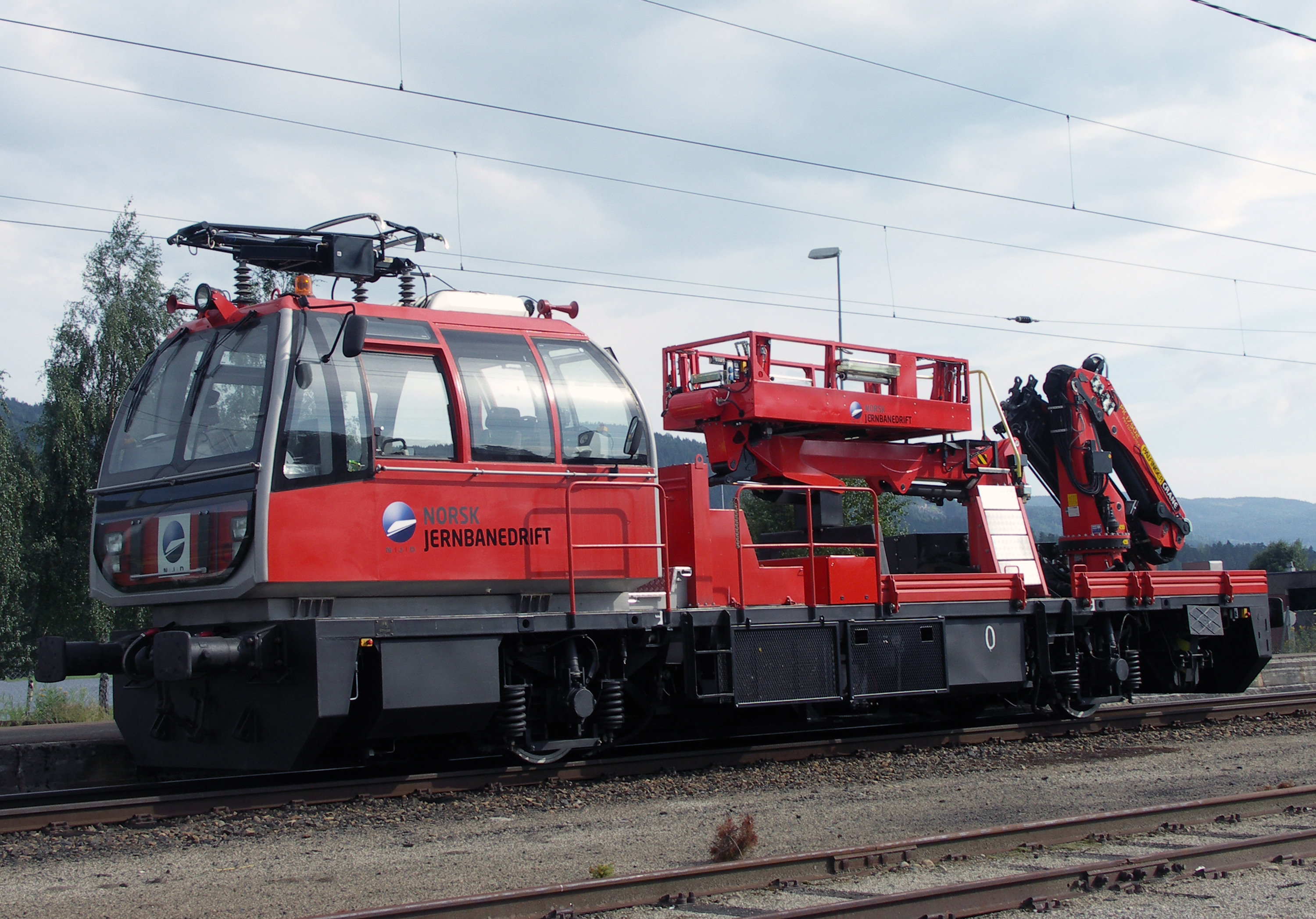 Монтажно-восстановительная автомотриса АДМ-1,3см, производства ОАО Тихорецкий машиностроительный завод им. В.В. Воровского